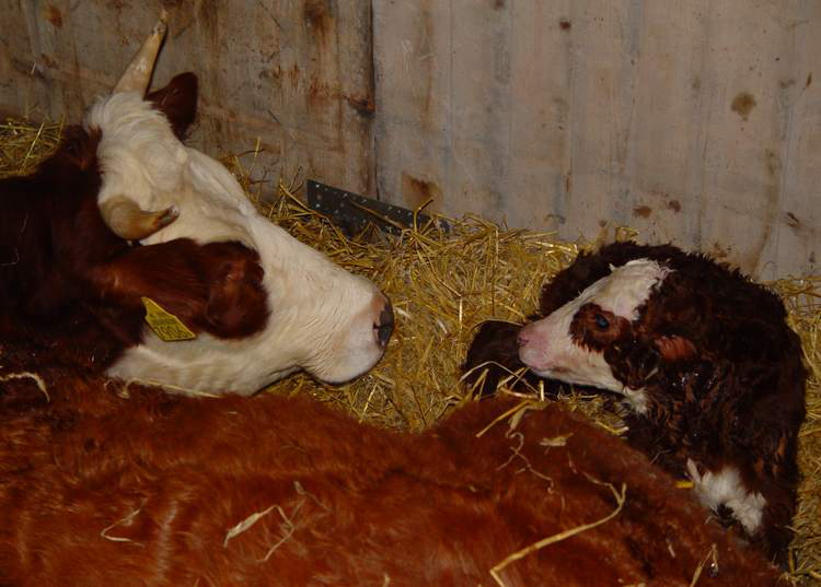 Groninger Blaarkop met kalf